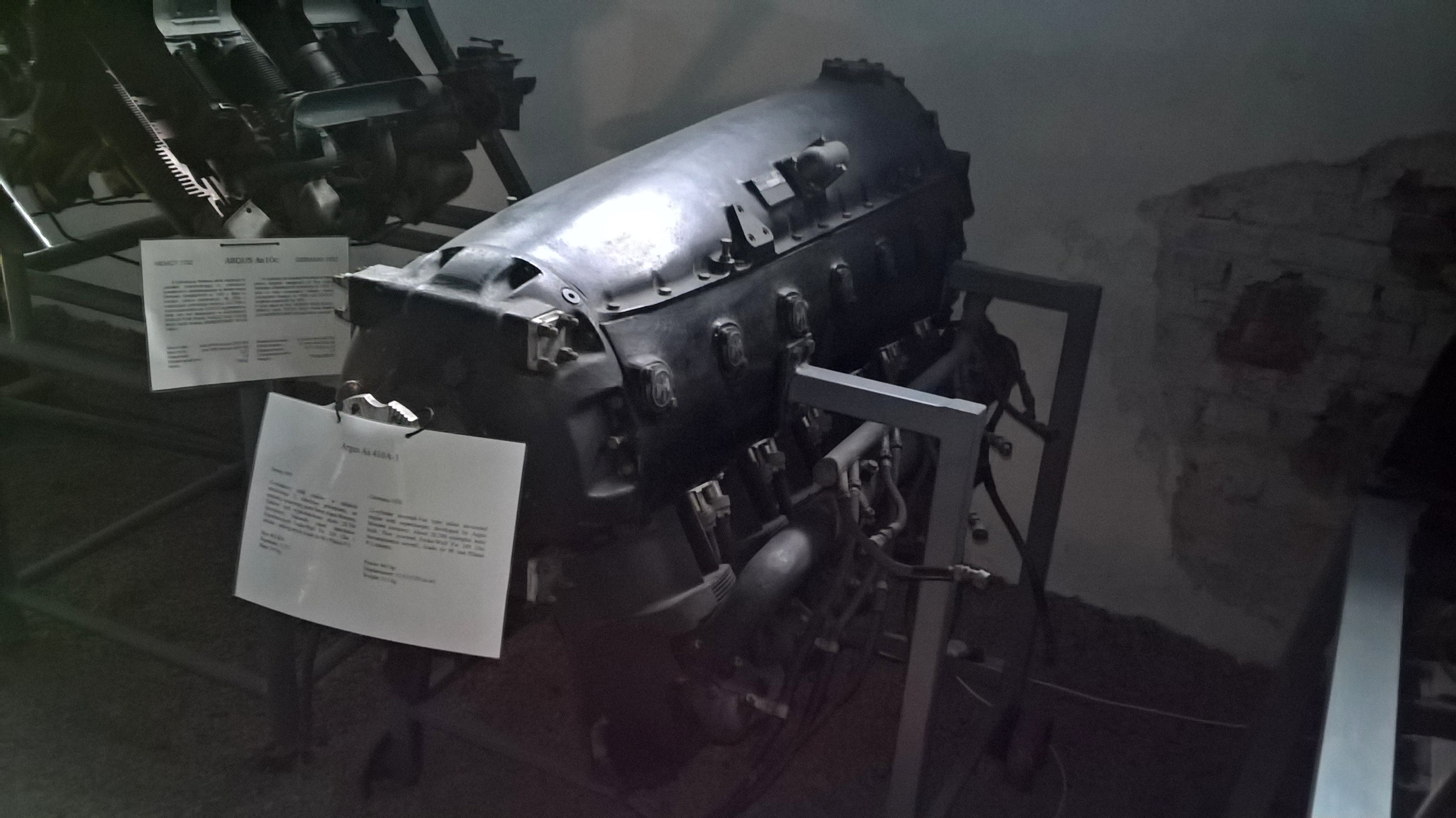 Niemiecki 12-cylindrowy silnik widlasty Argus As-410 z 1940 r. ze zbiorów Muzeum Lotnictwa Polskiego w Krakowie.